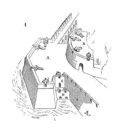 ...Voici (1) un de ces cavaliers copié sur l'un de ces bas-reliefs représentant la ville d'Arras...